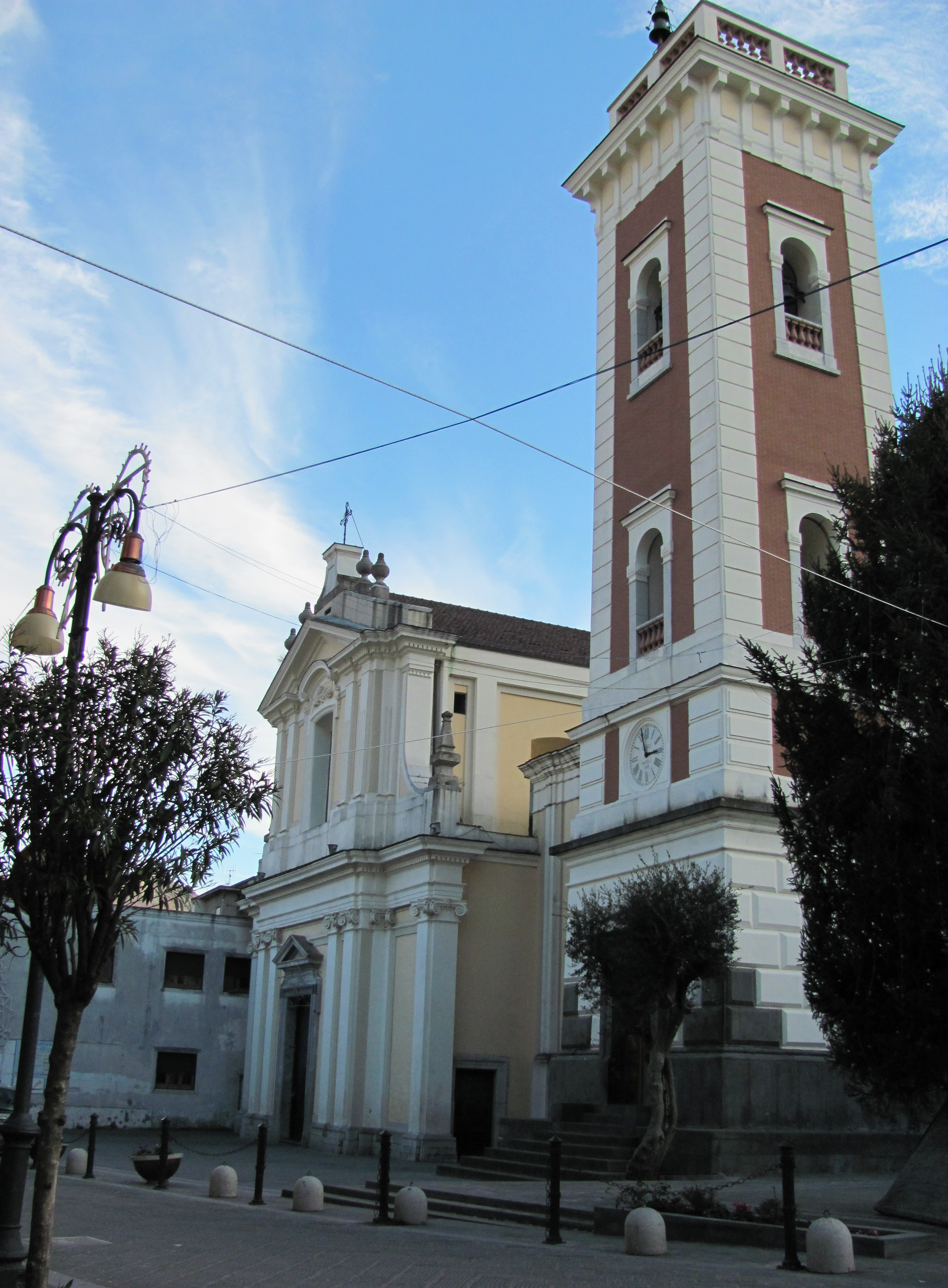 Chiesa di San Rocco con Campanile SIANO SA (dicembre 2010)